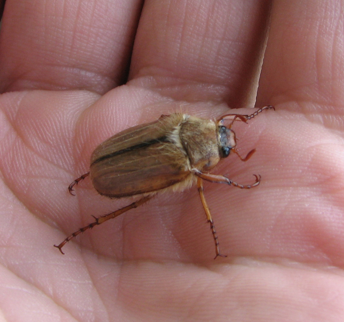 Rhizotrogus solstitialis